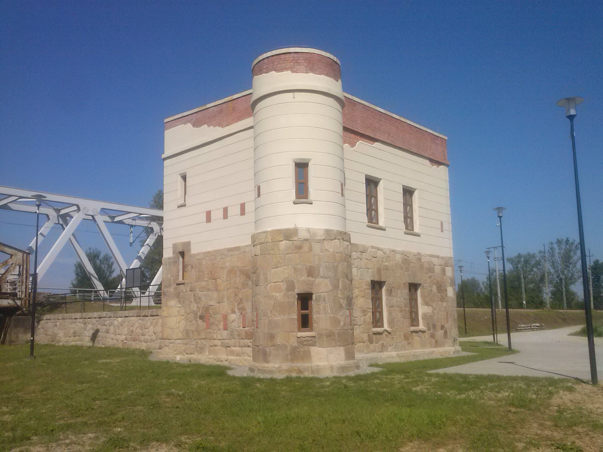 Strażnica kolejowa w Chodaczowie - obecnie własność Gminy Tryńcza, widok od czerwca 2019 po remoncie